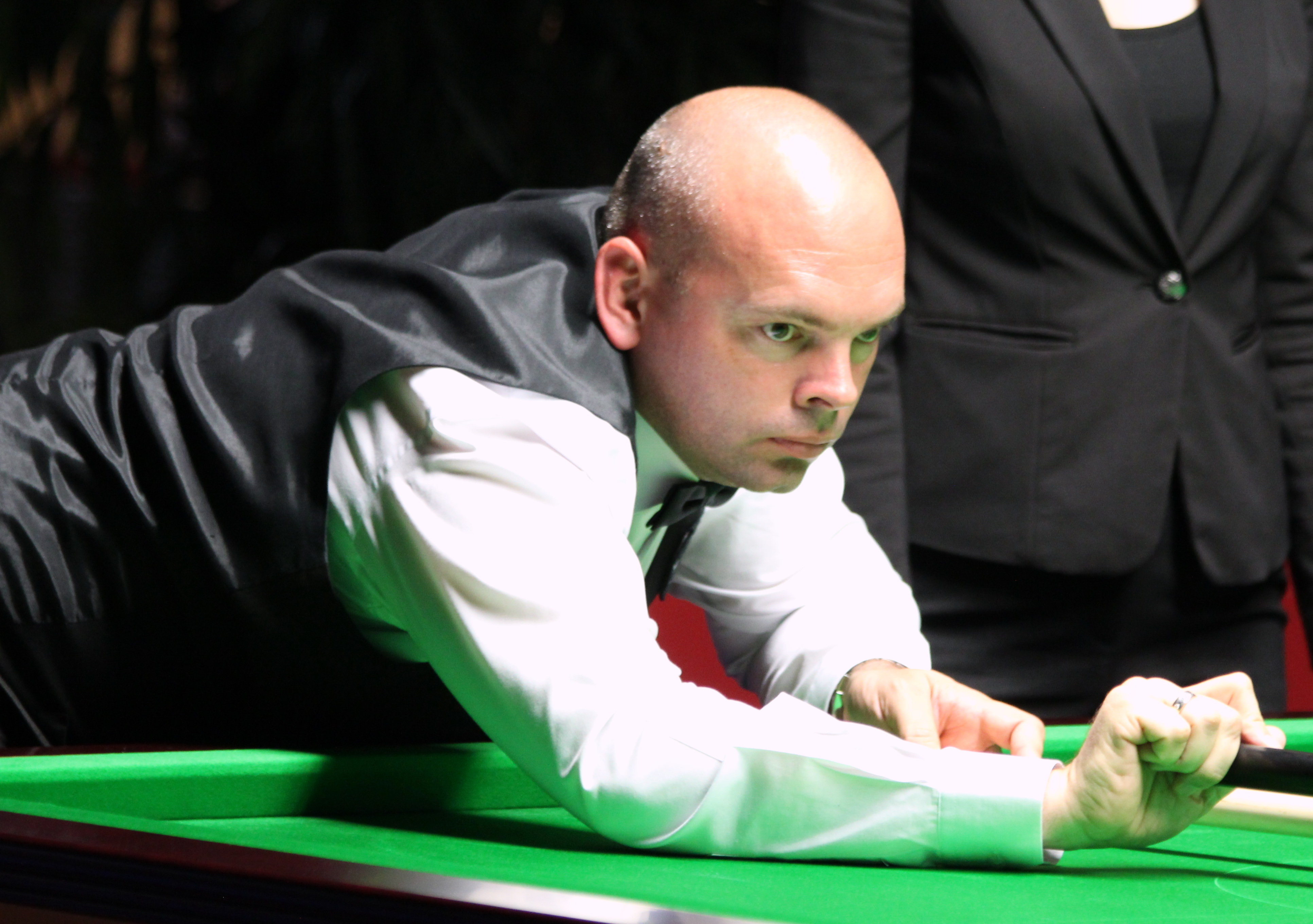 Stuart Bingham beim Paul Hunter Classic 2016